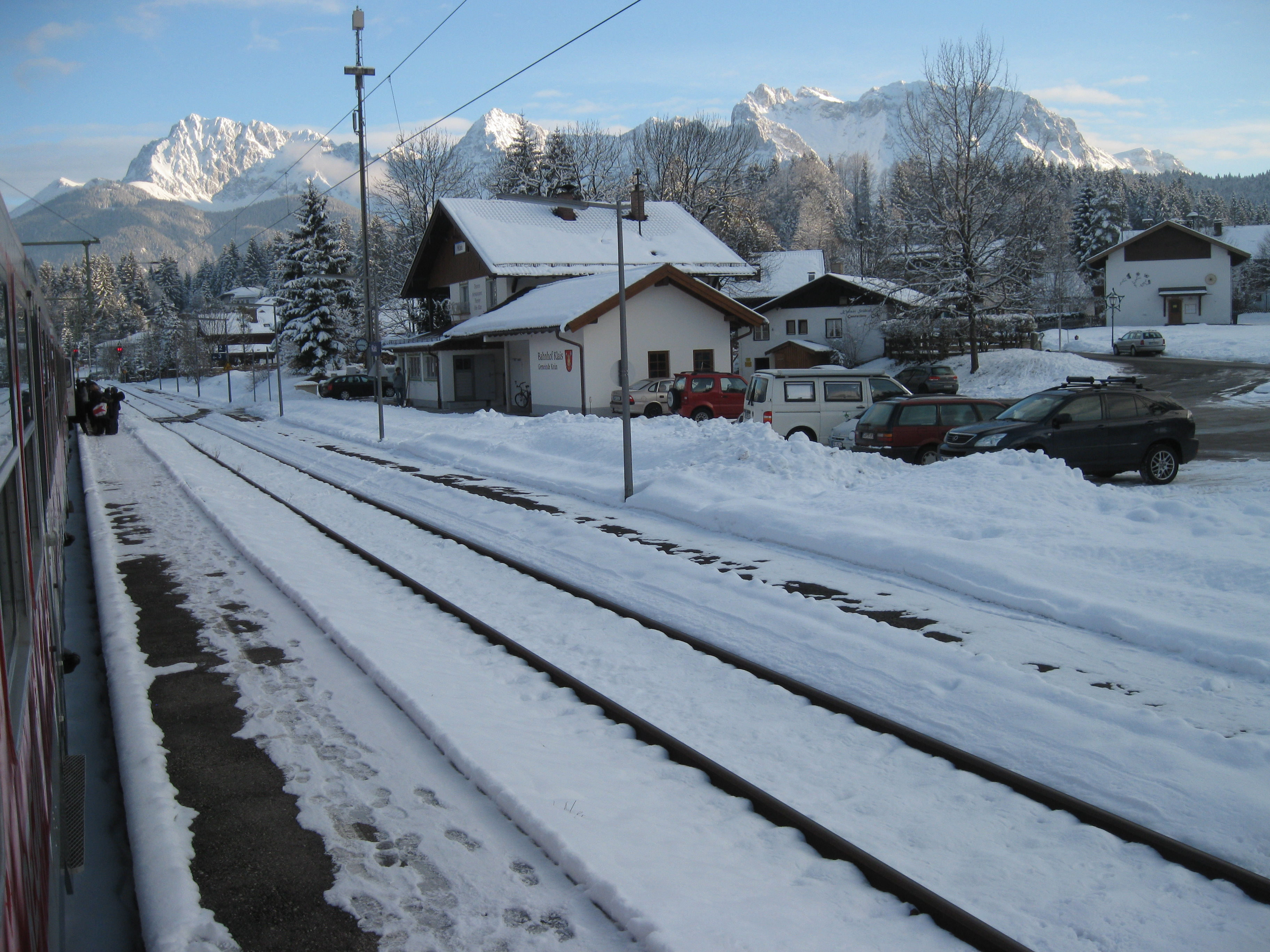 Banegården i Klais, Tyskland